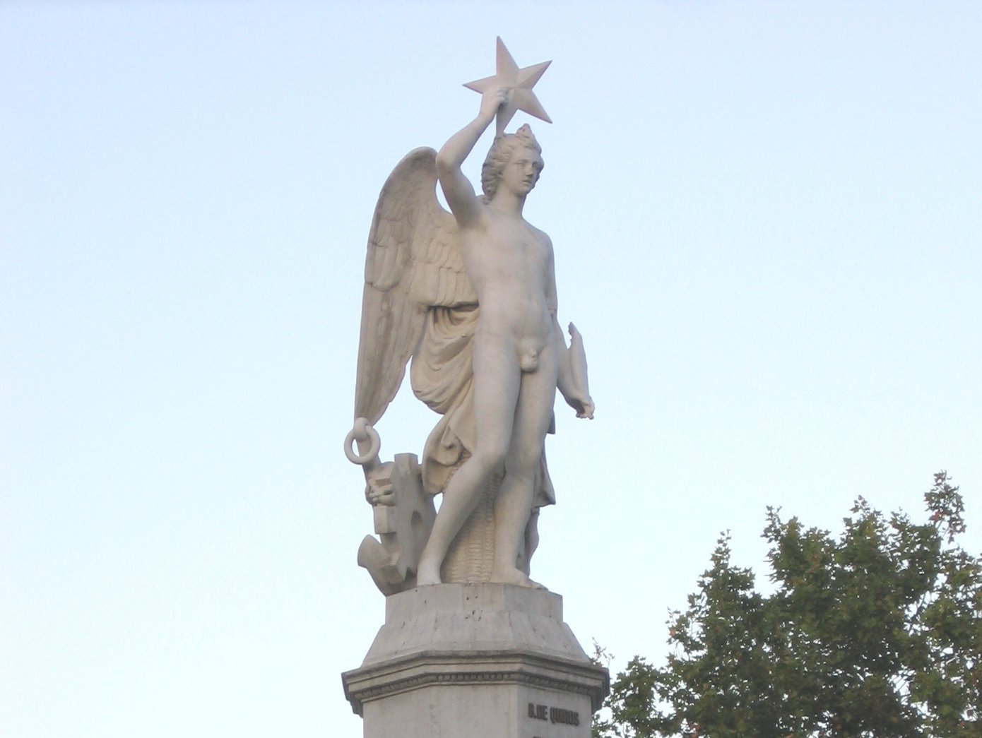 Fuente del Genio Catalán. Al Marqués de Campo Sagrado (1856), de Faust Baratta y Josep Anicet Santigosa, Pla de Palau, Barcelona.